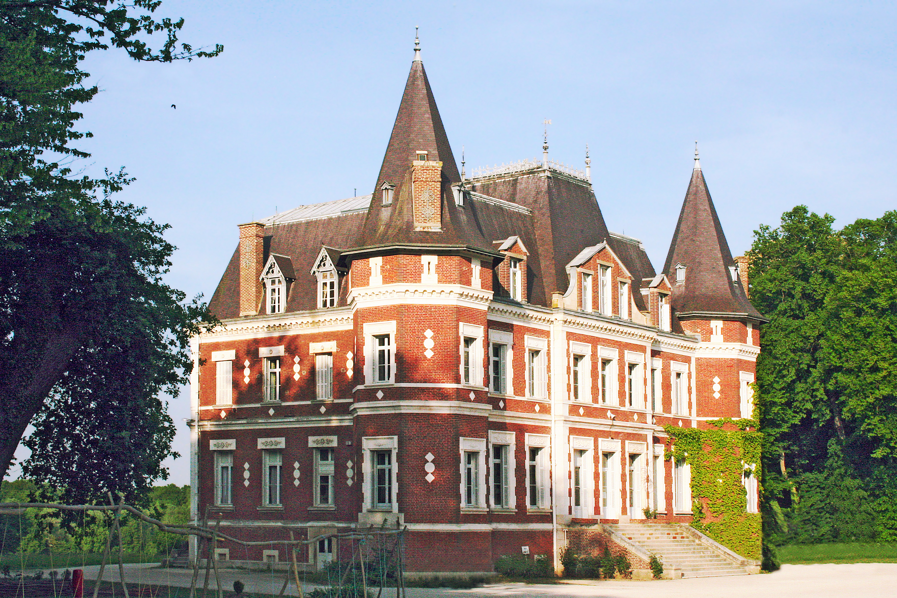 Château de Montceau-lès-Vaudes